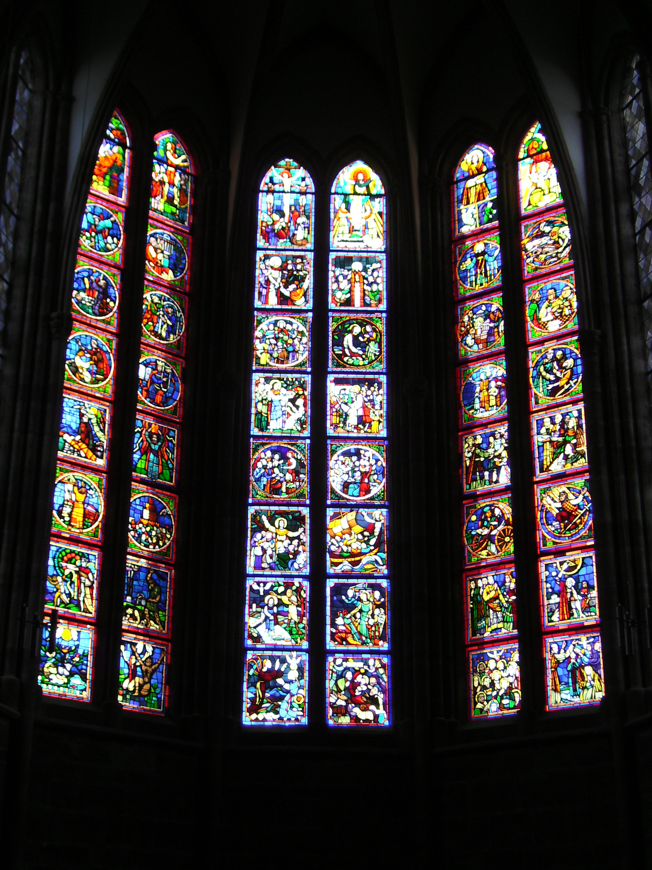 St. Arnual: Stiftskirche, Kirchenfenster von György Lehoczky